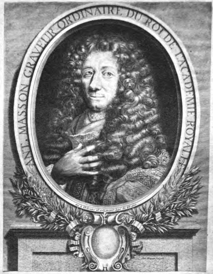 "Antoine Masson, graveur ordinaire du Roi, de l'Académie royale."